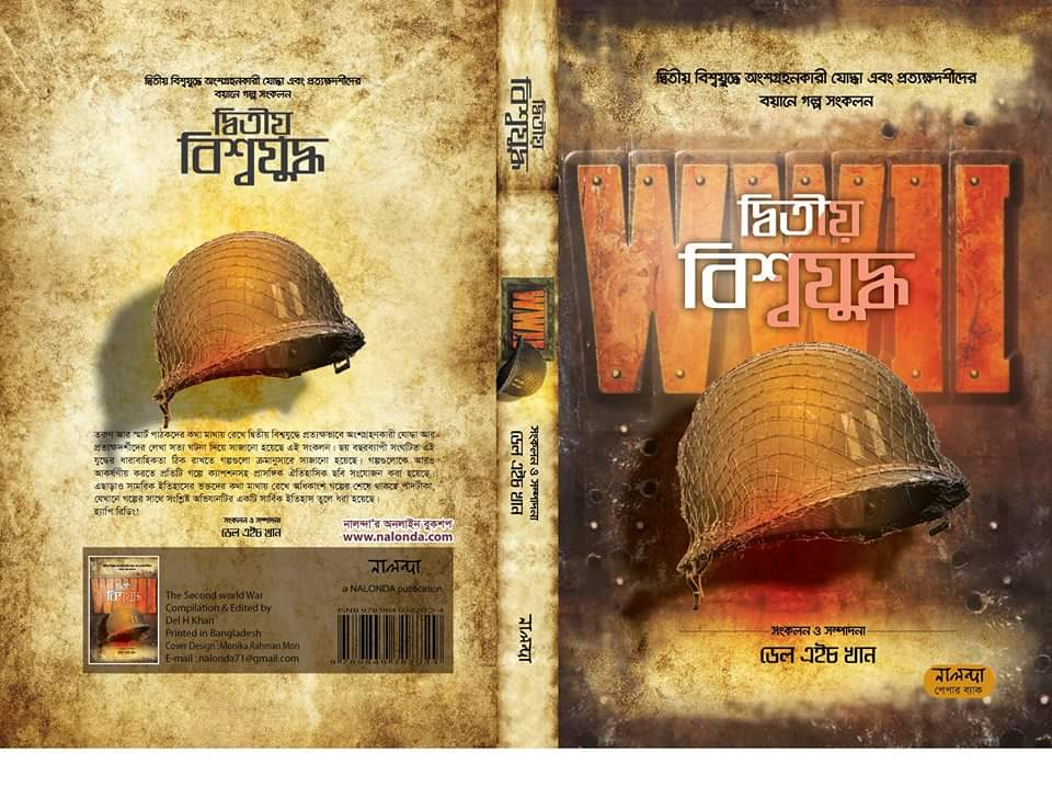 dwitiyo bishwajuddha is a Bengali translated book